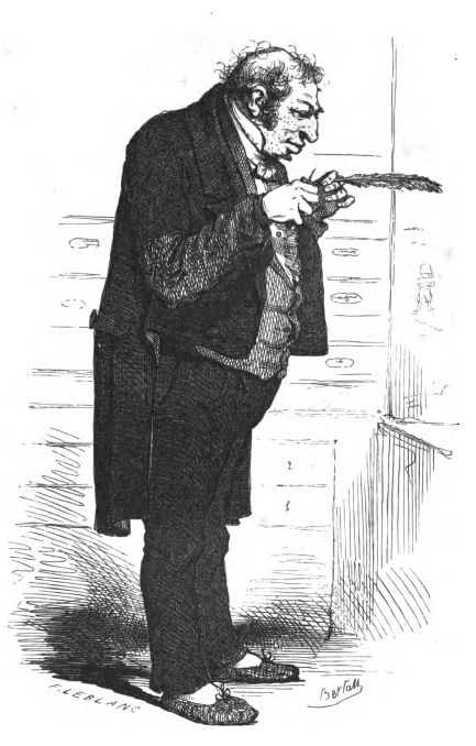 Illustration pour Les Employés de Balzac, édition Houssiaux, tome XI